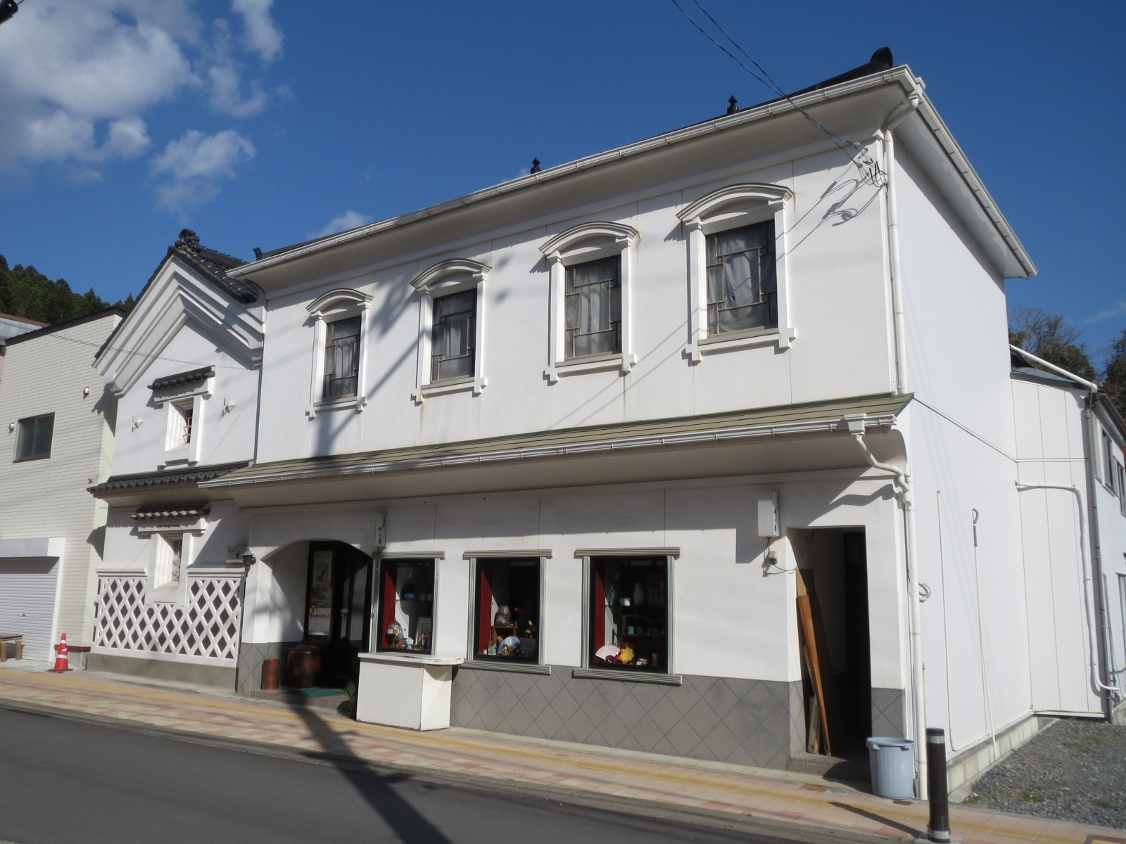 気仙沼市にある三事堂ささ木 Canon IXY 3